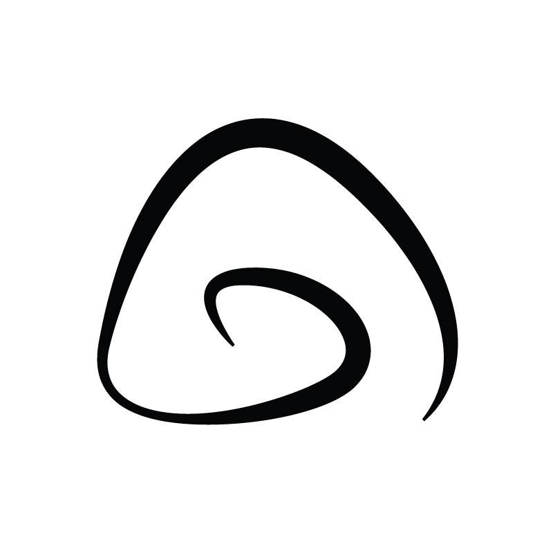 Snilerevyens faste logo